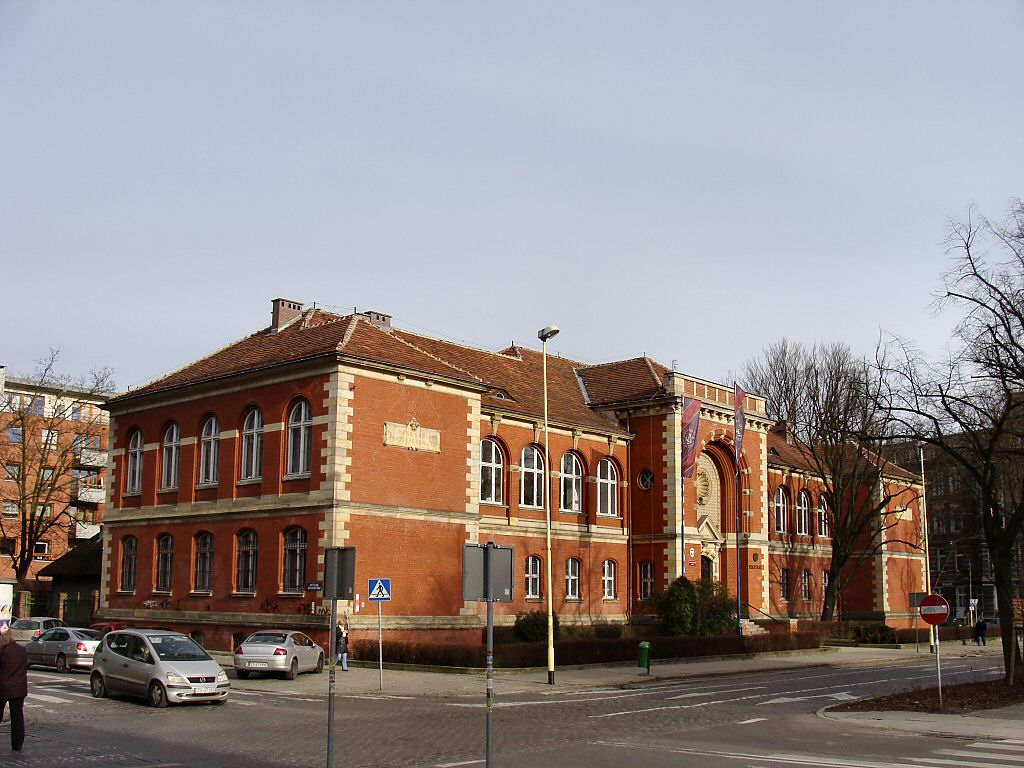 Rektorat Uniwersytetu Szczecińskiego przy al. Jana Pawła II w Szczecinie - obiekt zabytkowy